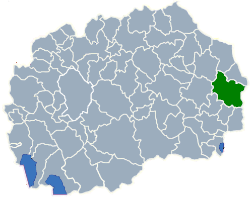 Map of Opština Berovo (Берово)